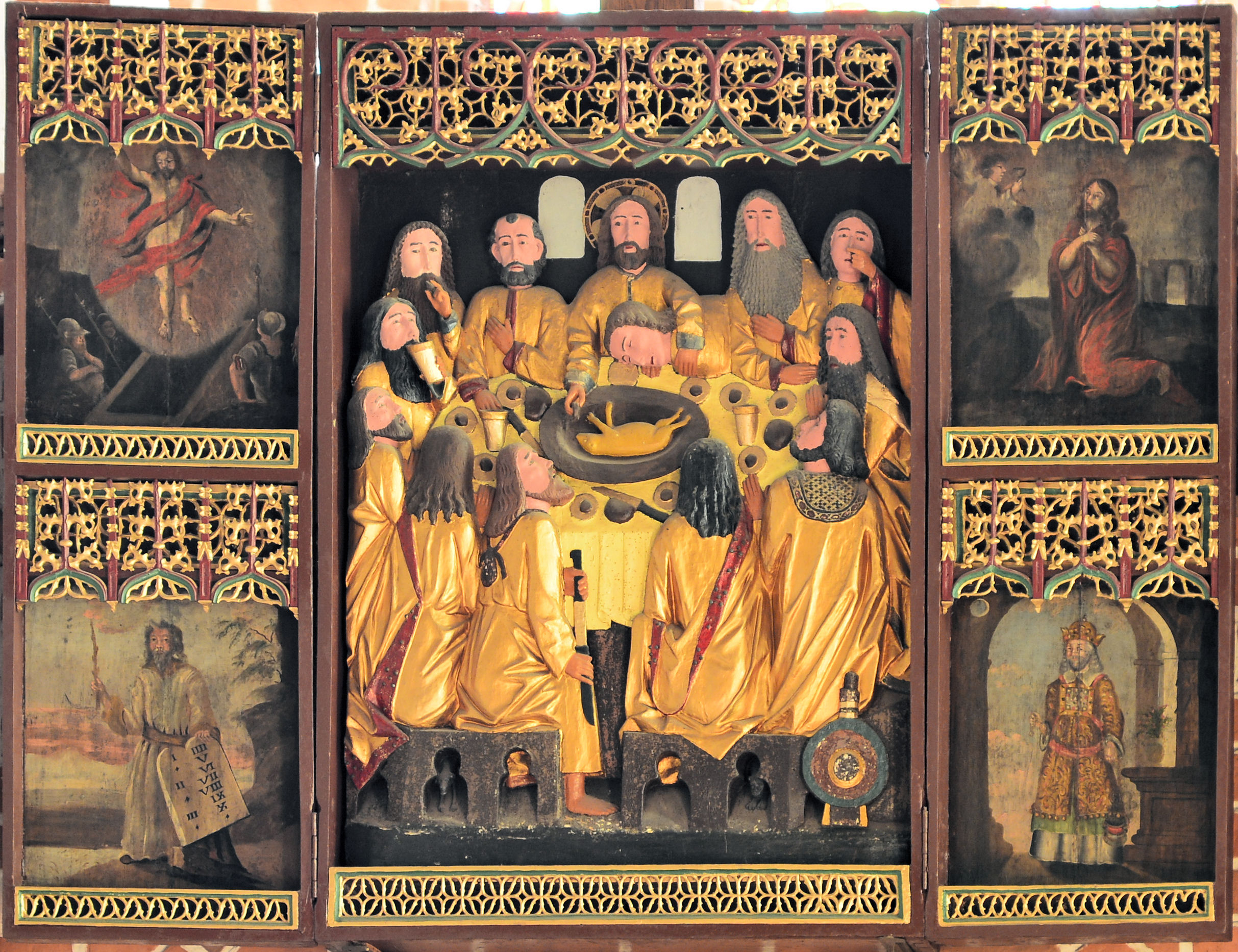 Kościół Wniebowzięcia NMP w Pyrzycach ołtarz główny